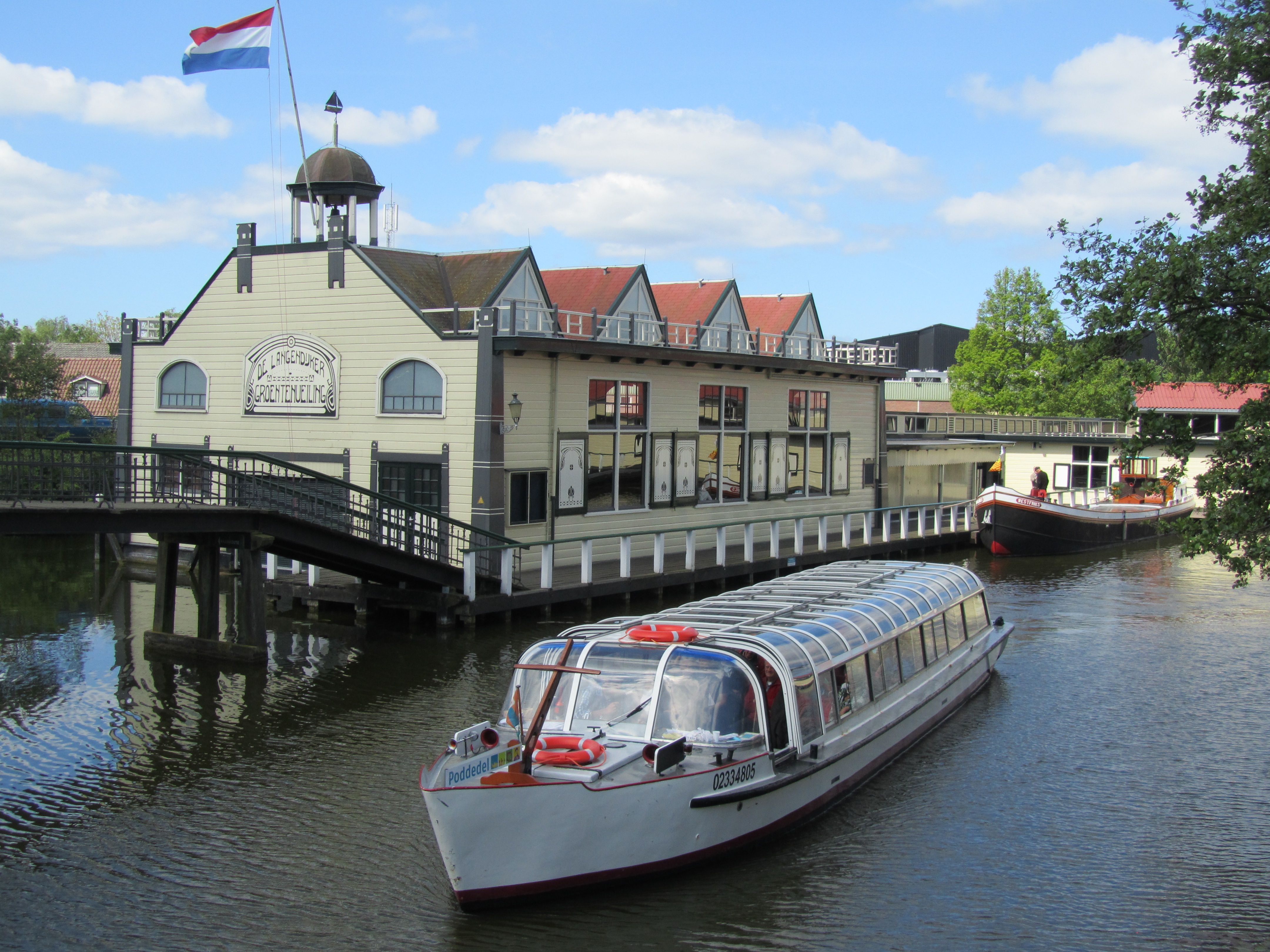 Het afmijnlokaal uit 1912 en de rondvaartboot die bezoekers van Museum BroekerVeiling rondvaart voor het nabijgelegen Rijk der Duizend Eilanden